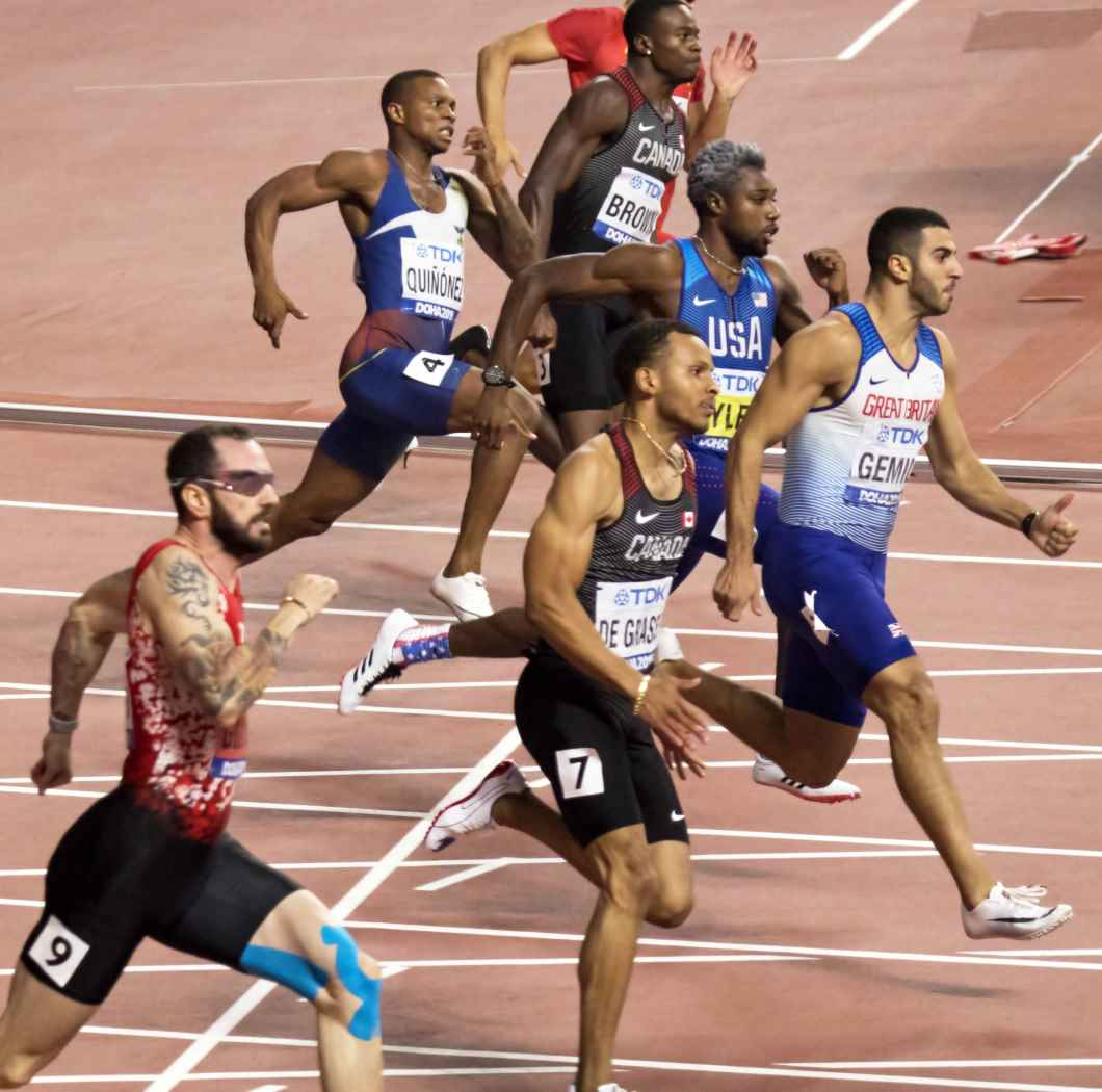 DOH50270 200m men final